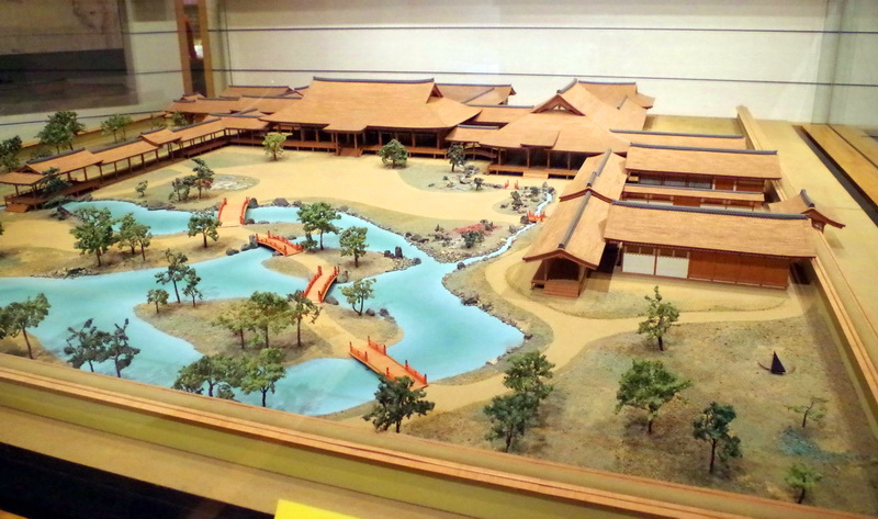 東三条殿復元模型（国立歴史民俗博物館）, 太田静六案に基づく。